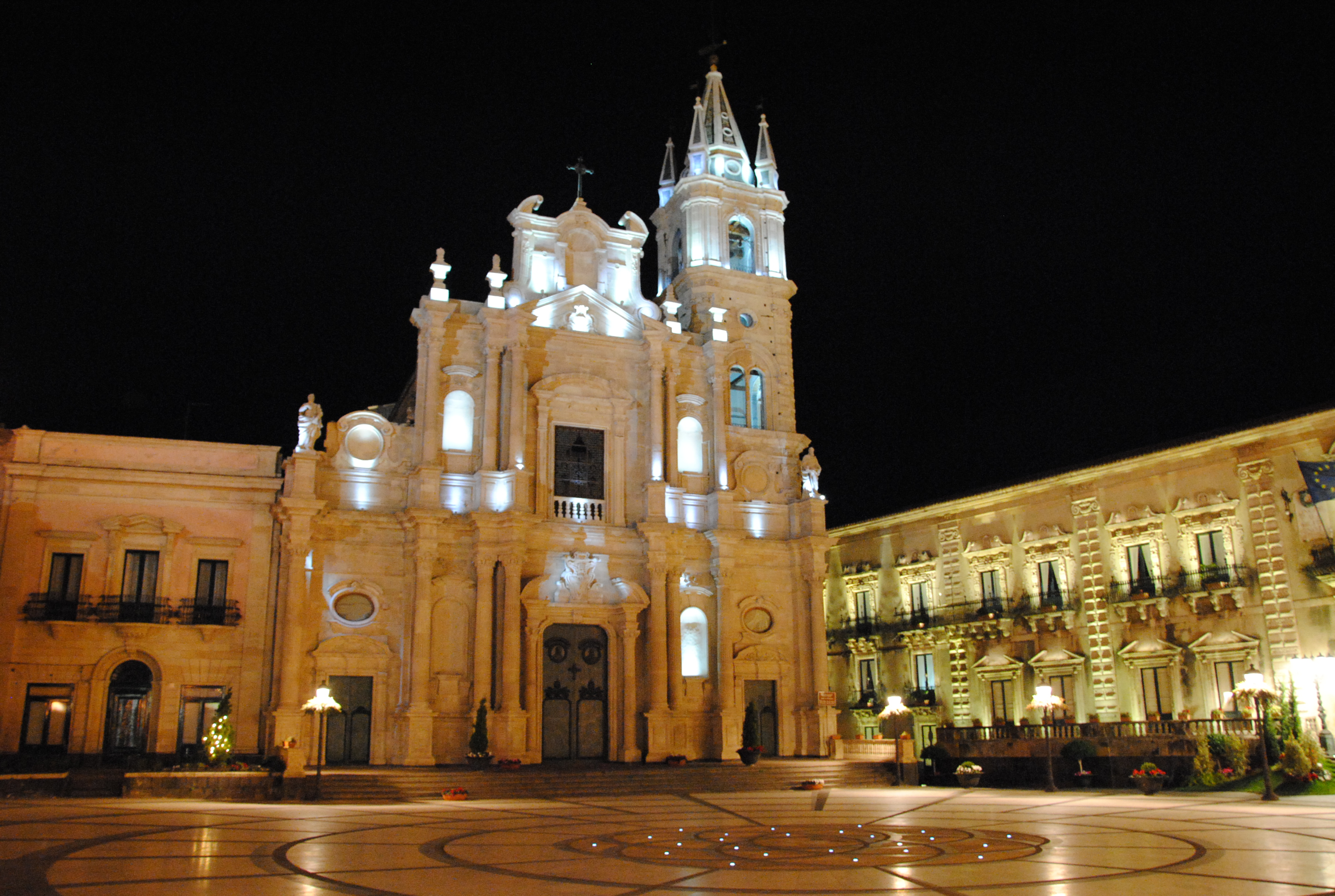 Acireale - Sicilia - Itália